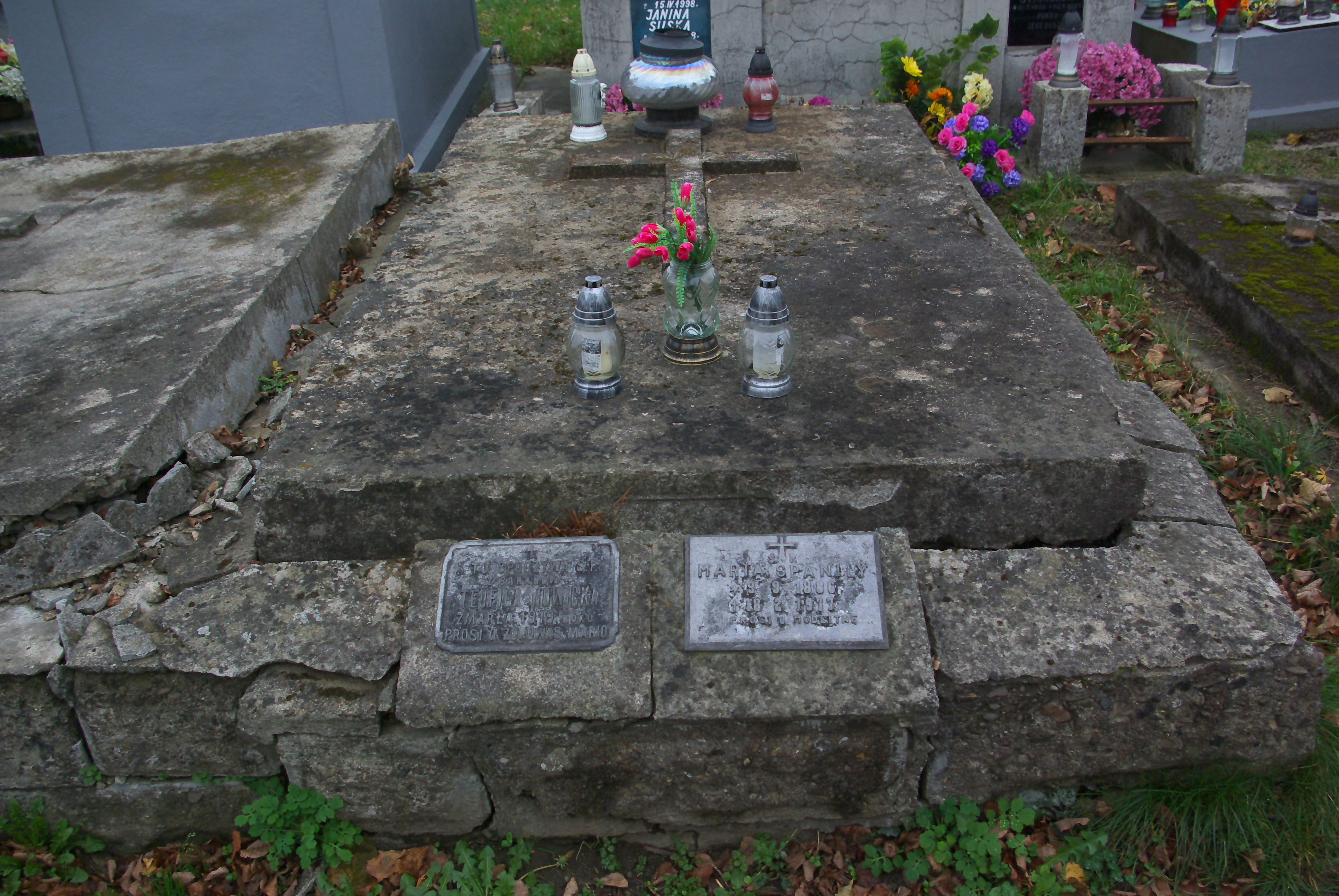 Grobowiec Teofili Nowickiej i Marii Spanily na Cmentarzu Centralnym w Sanoku (2019).